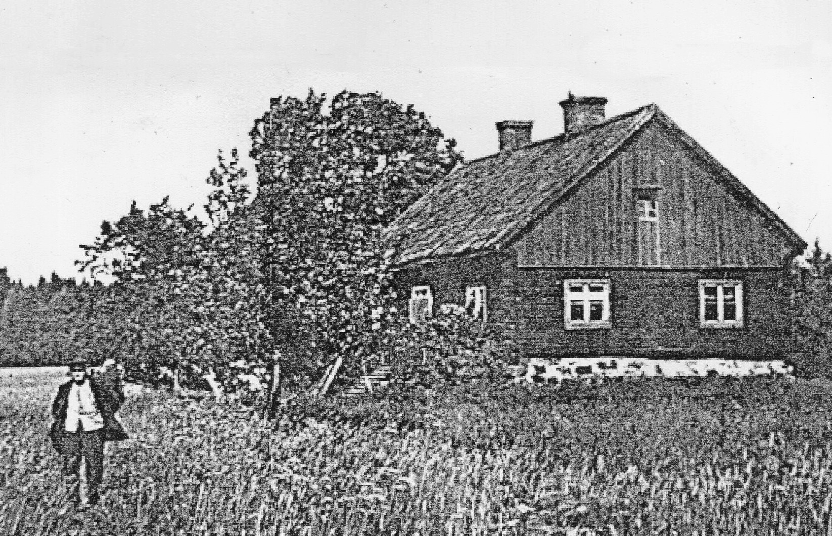 Edebys huvudbyggnad 1912